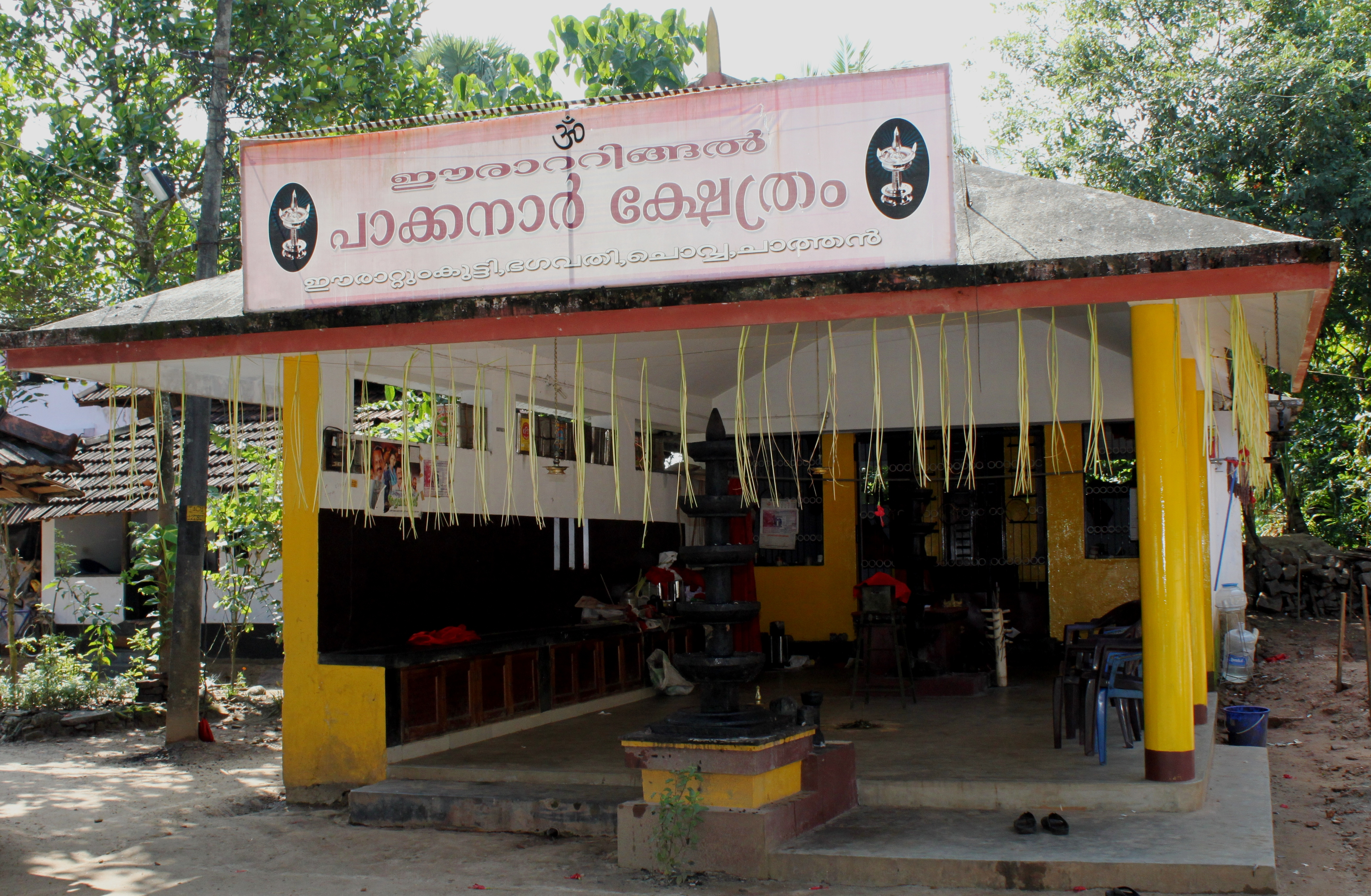 ഈരാറ്റിങ്കൽ പാക്കനാർ ക്ഷേത്രം